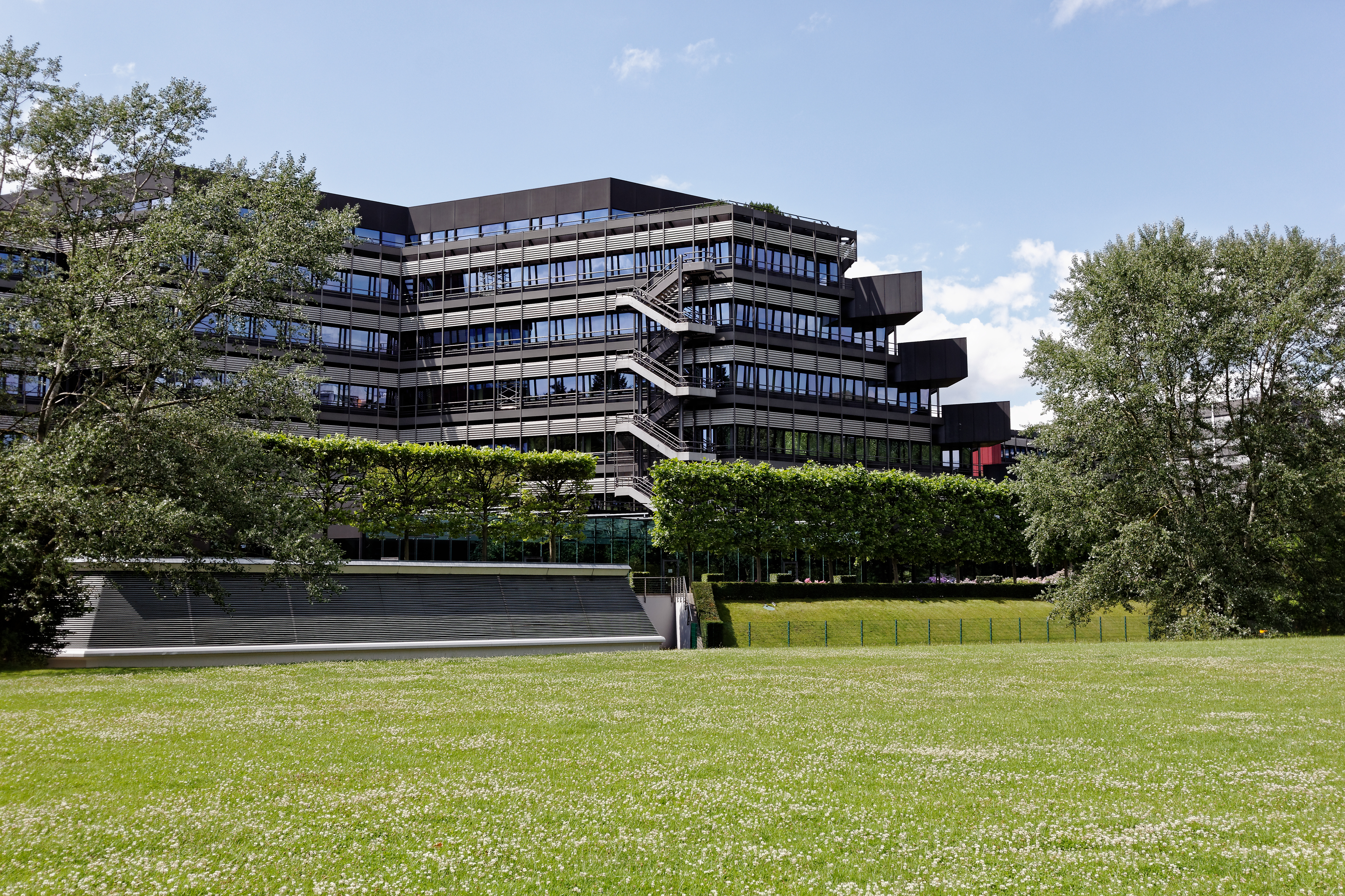 Hamburg-Winterhude, City-Nord-Park, Hauptwiese mit Gebäude Überseering 45This is a photograph of an architectural monument.